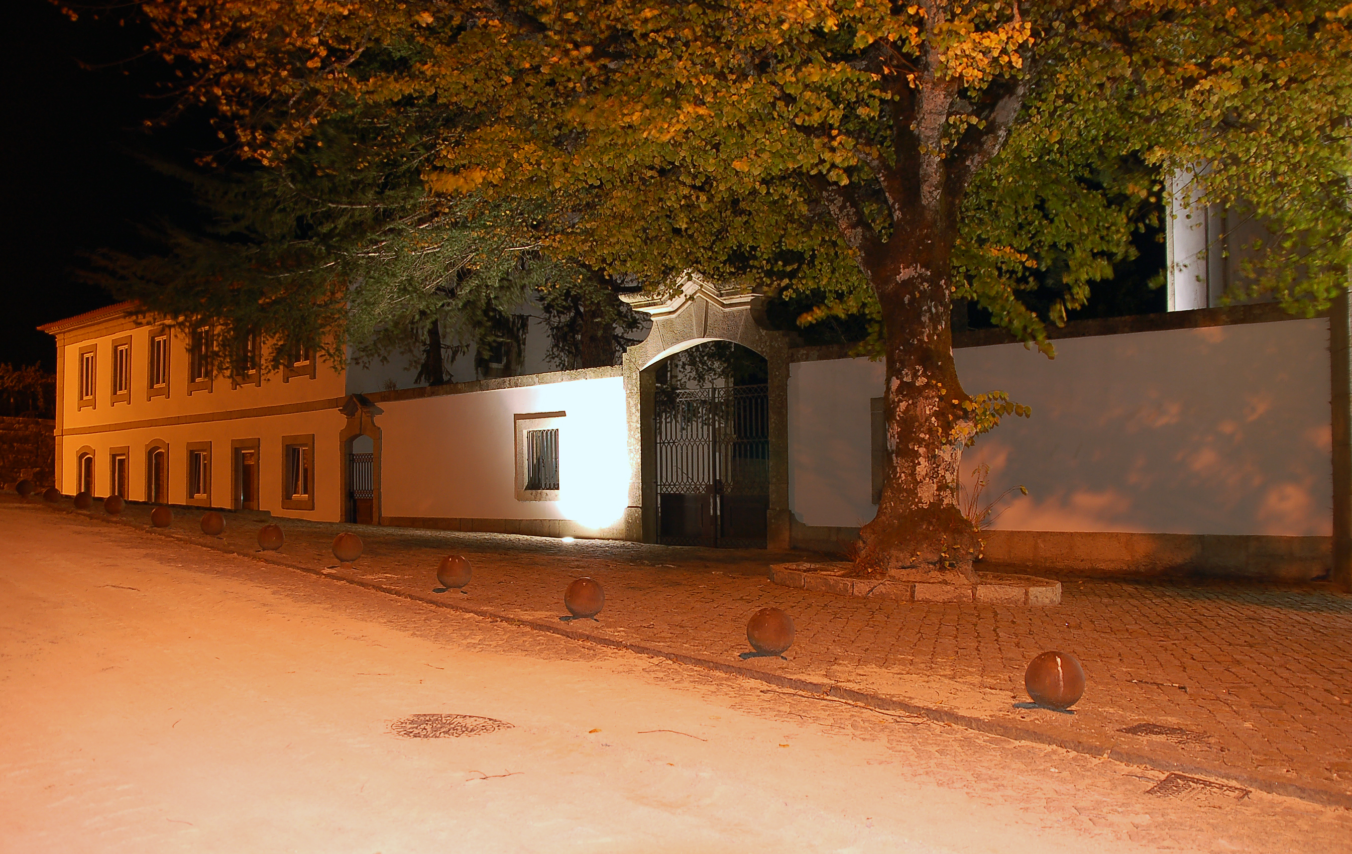 Convento do Desagravo do Séc. XVIII e está localizado perto da Serra da Estrela e Serra do Açôr c/ ambiente romântico e tranquilo.